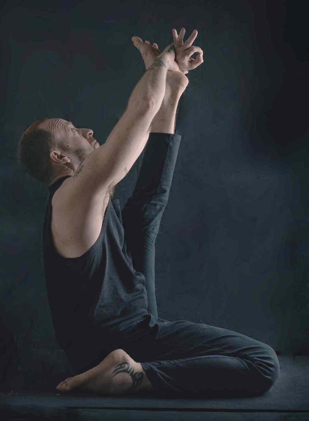 500px provided description: Leon [#portrait ,#man ,#sport ,#yoga ,#stretch ,#fitness]